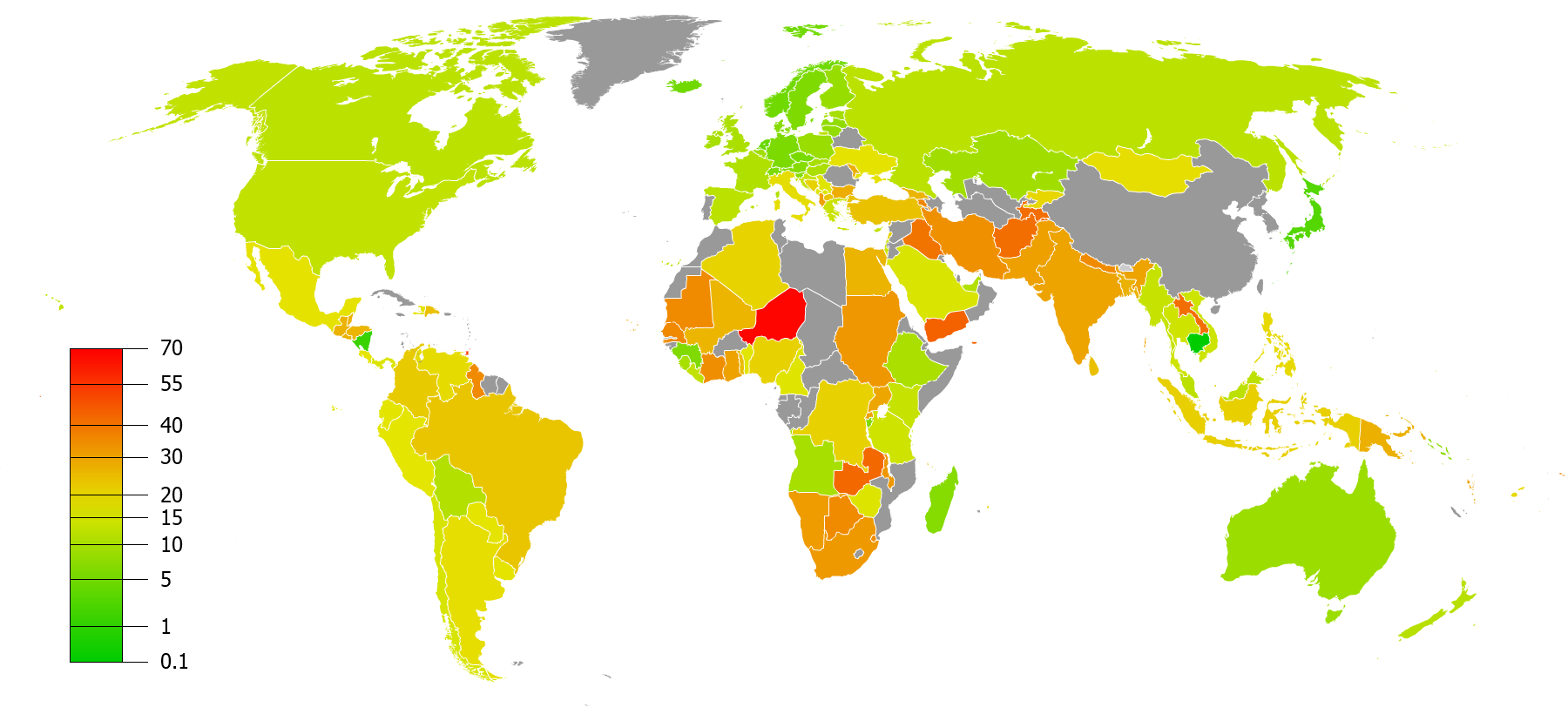 ILOデータによる15～24歳層のニート比率（最新年度）